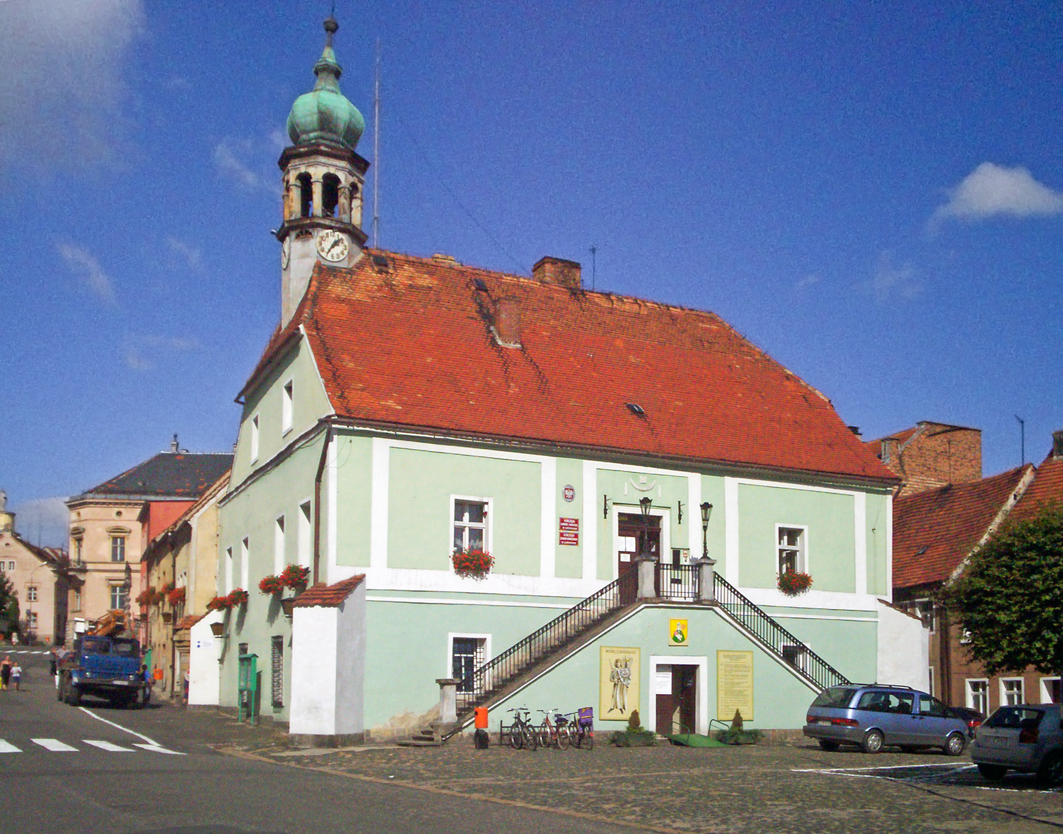 Lubomierz, ratusz.